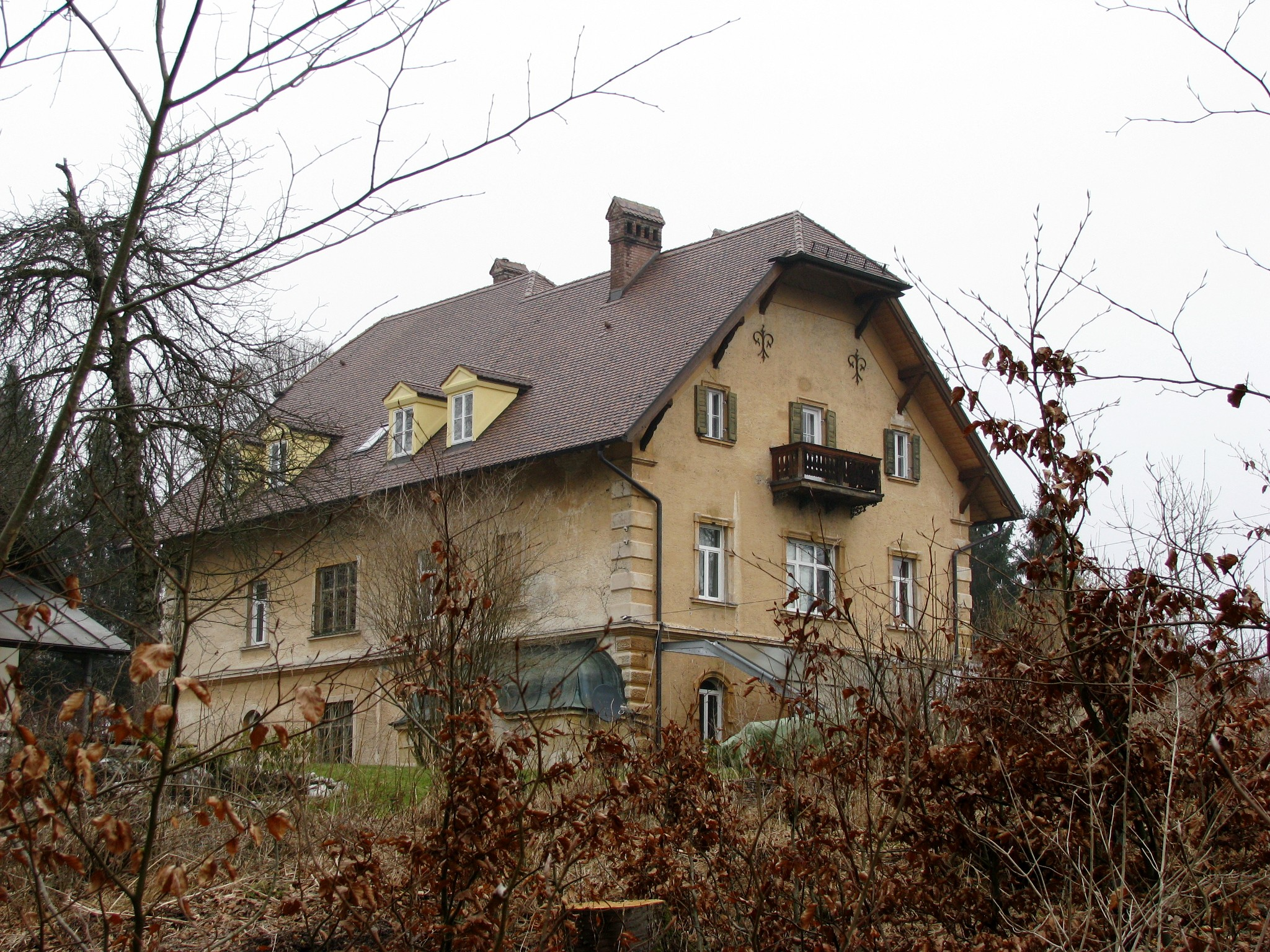 Schloss Hohenberg bei Seeshaupt in Oberbayern